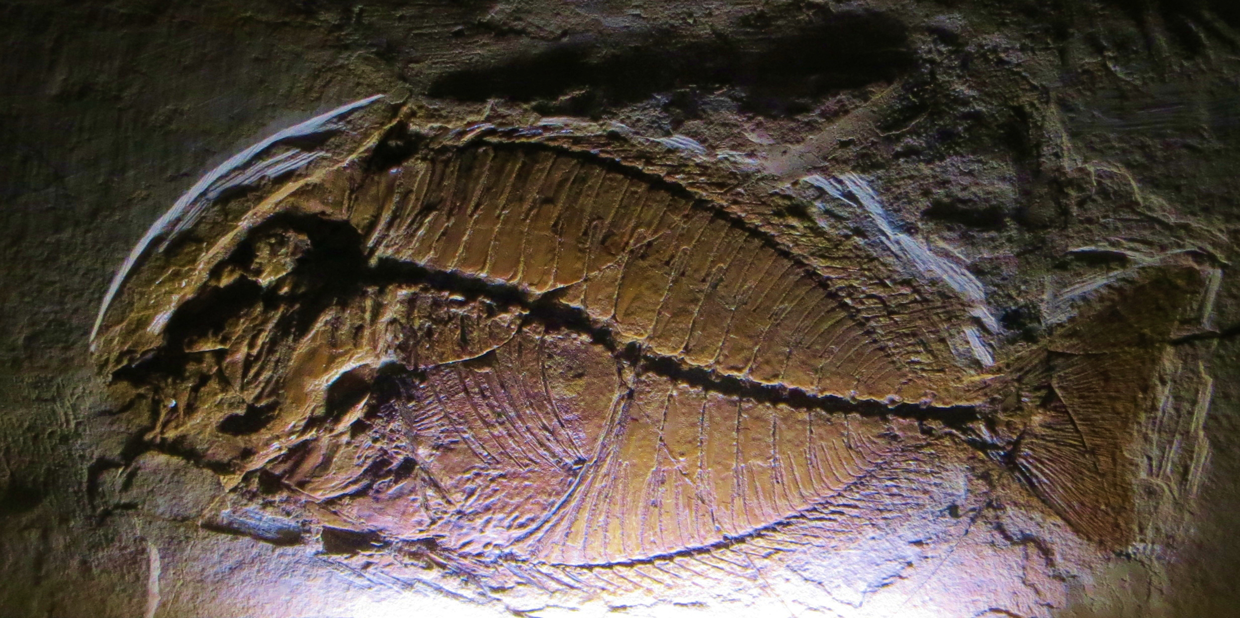 Fossil of Tylerichthys, an extinct fish- Took the photo at Museo di Storia Naturale di Venezia